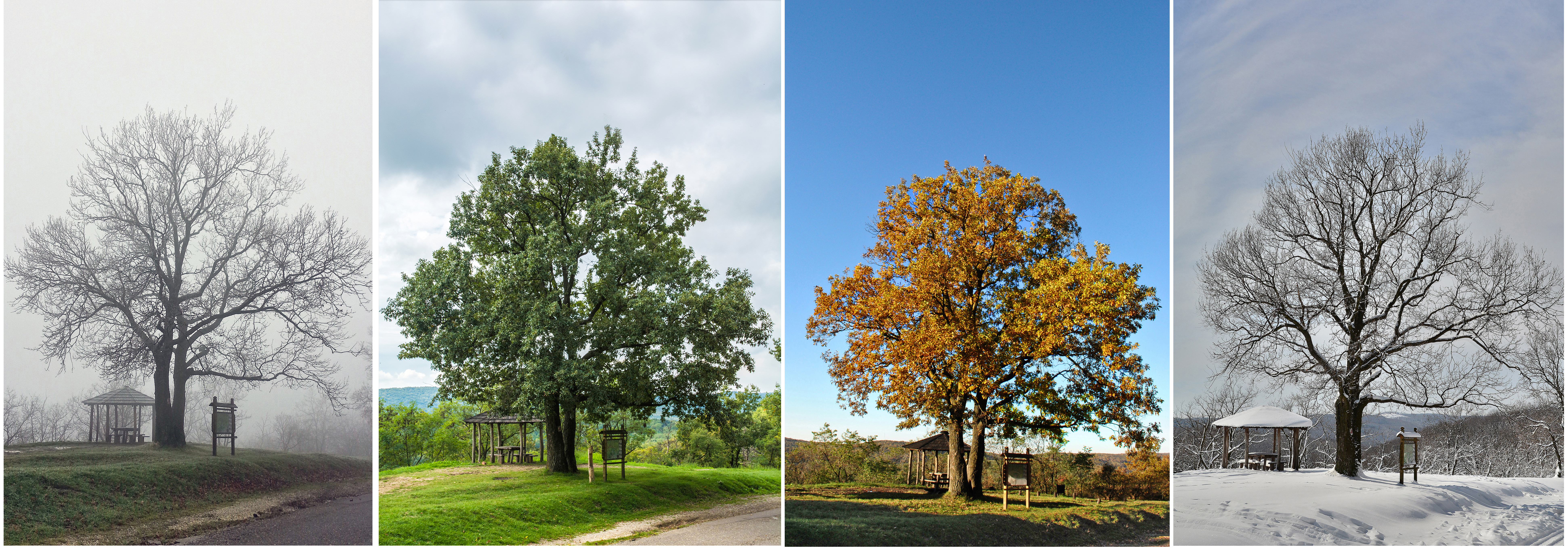 Ово је фотографија заштићеног природног добра у Србији под шифром: НП01 This is a a photo of a natural area in Serbia with ID: НП01 Hrast Medunac na Zmajevcu (Fruška gora) fotografisan u 4 godisnja doba.